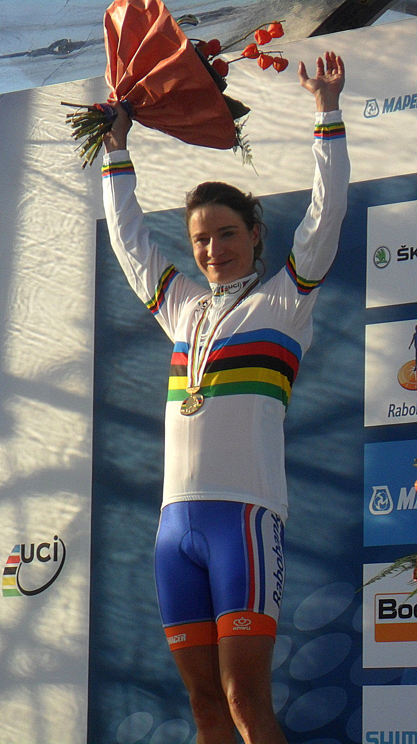 Podiumceremonie van het Wereldkampioenschap 2012 in Valkenburg, Nederland. 1. Marianne Vos, Nederland 2. Rachel Neylan, Australië 3. Elisa Longo Borghini, Italië